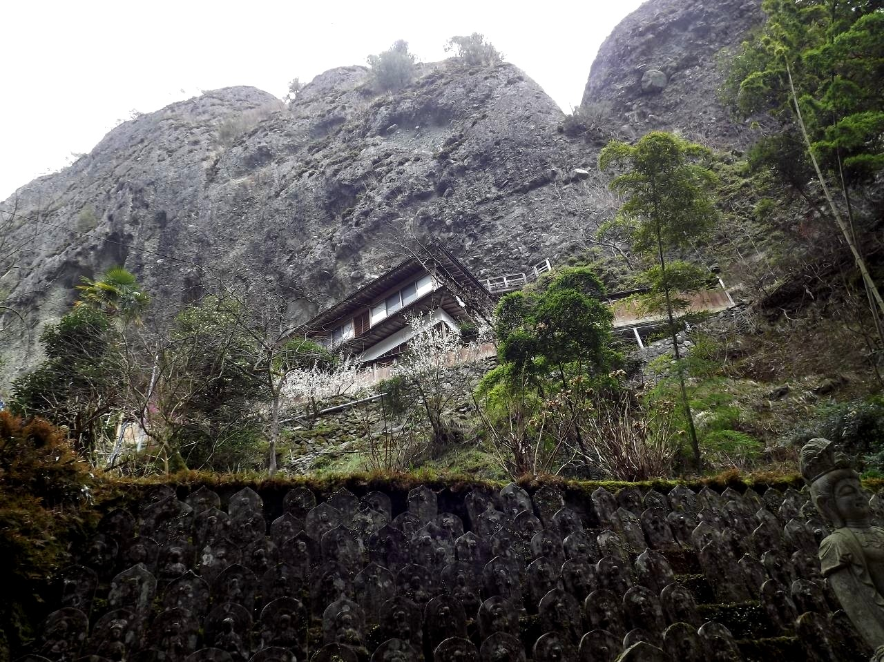 岩屋寺の本坊